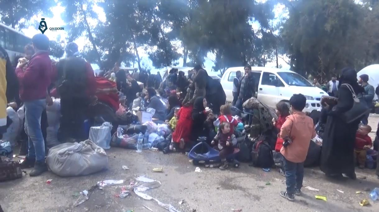 Civils et rebelles de la Ghouta orientale arrivant à Idleb le 2 avril 2018.